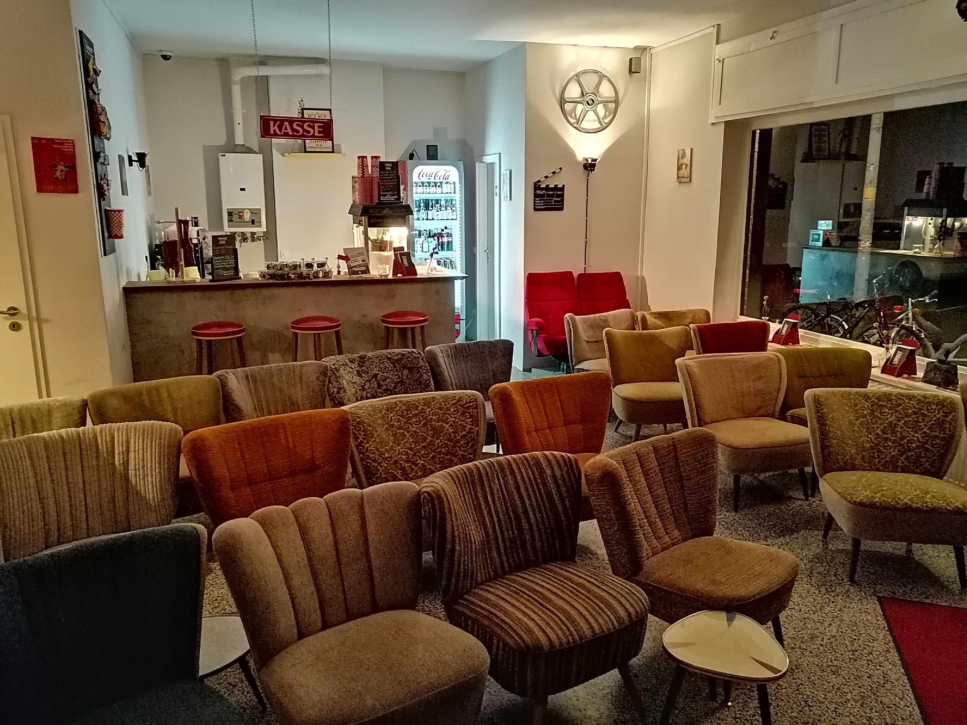 Lodderbast-Kino Hannover, Innenansicht